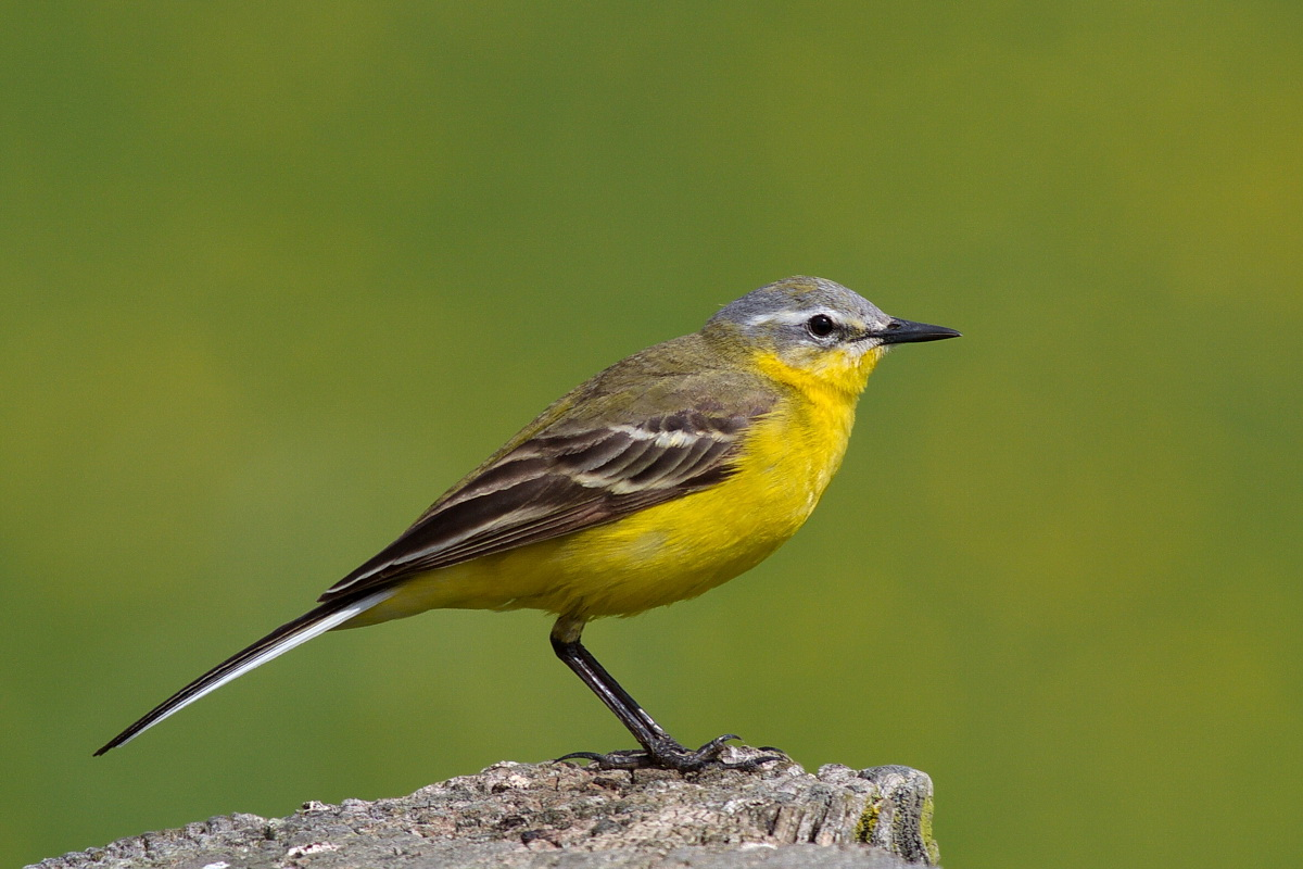 Wiesenschafstelze auf Zaunpfahl im Naturschutzgebiet Bislicher Insel in NRW, Deutschland